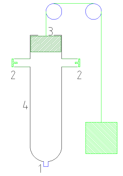 Schema eines Explosionsmotors nach Huygens.